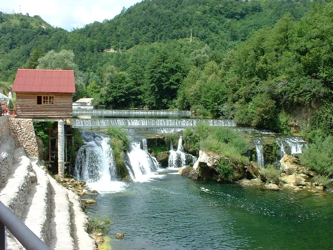 river Una, Kostela, BiH